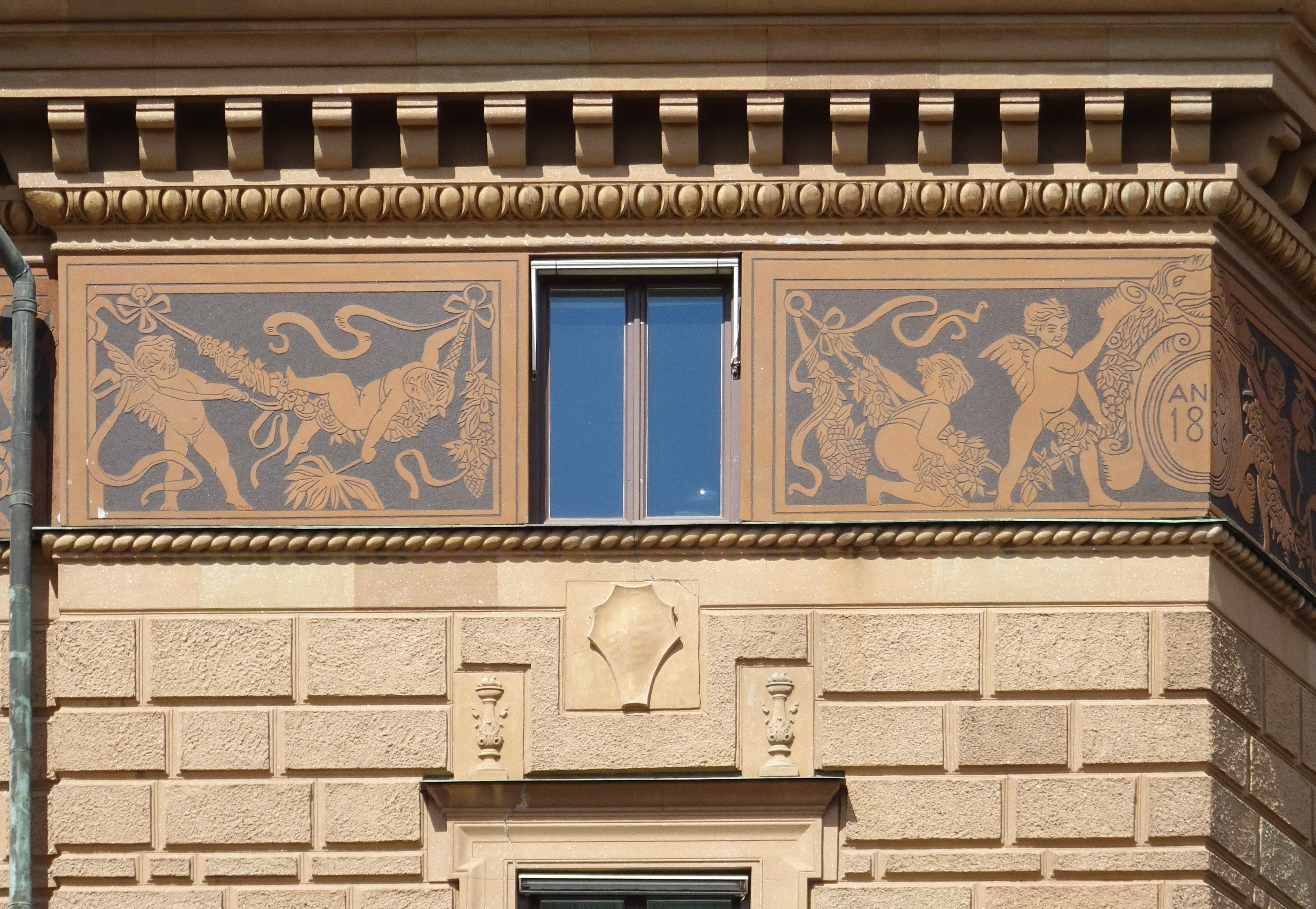 Hus "Strandvägen nr 19-21" i Stockholm, arkitekt Clason